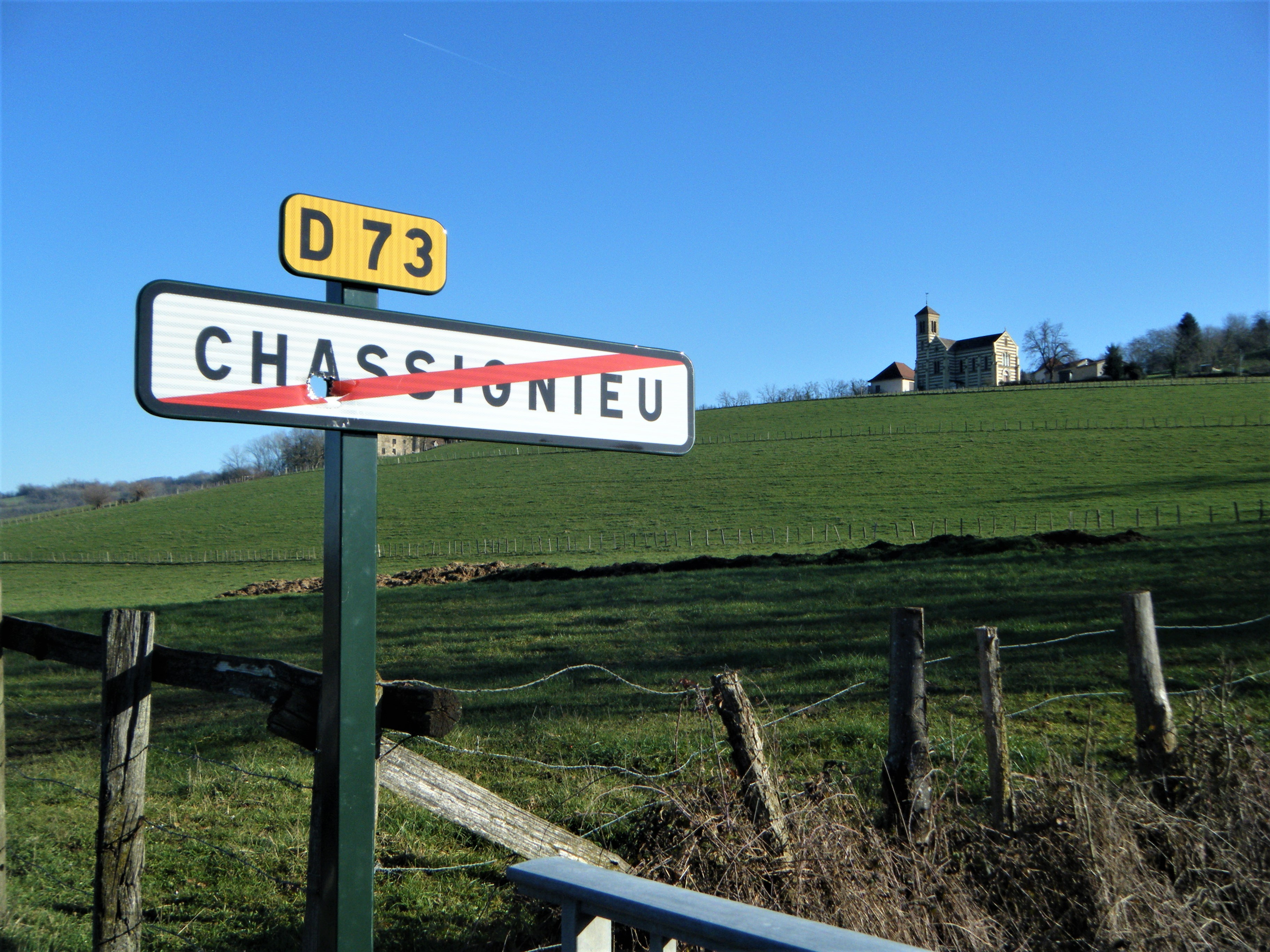 Panneau routier de Chassignieu